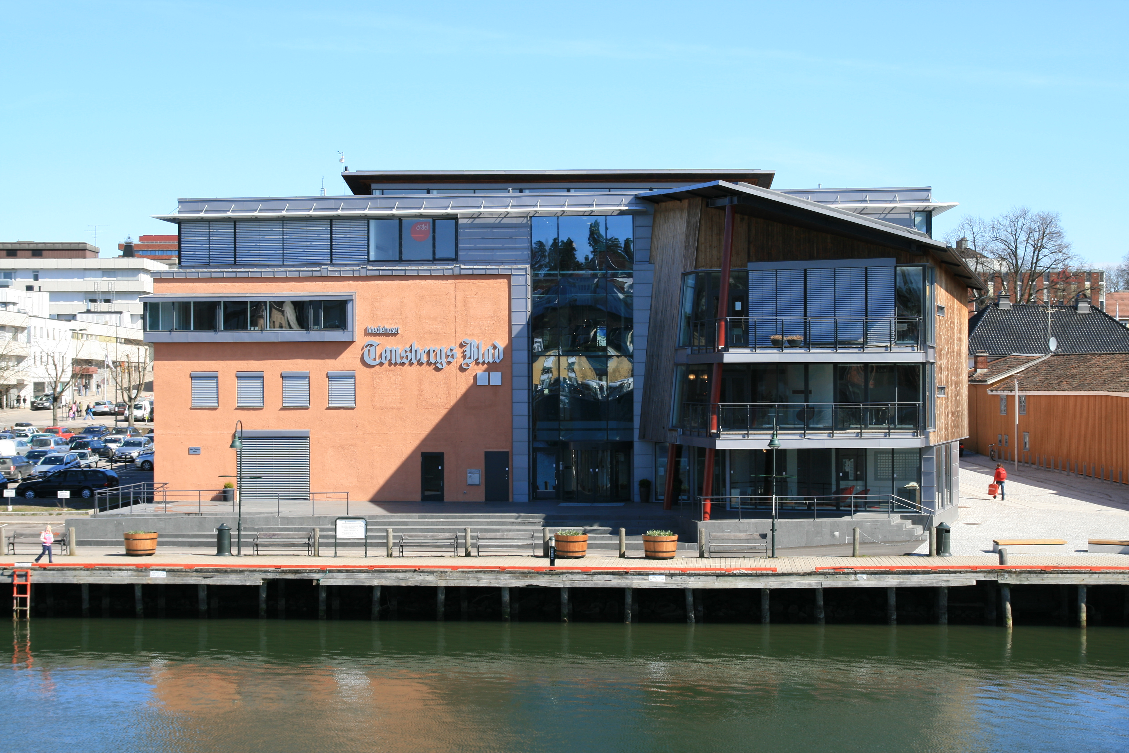 Tønsbergs Blad i sitt hypermoderne Mediehus på Tønsberg brygge, som ble åpnet lørdag 30.september 2006. Her finner man både TV- og radiostudio i tillegg til avisens redaksjoner. --- The regional newspaper Tønsbergs Blad opened a "Media House" in 2006, where the local radio and TV stations are housed too.